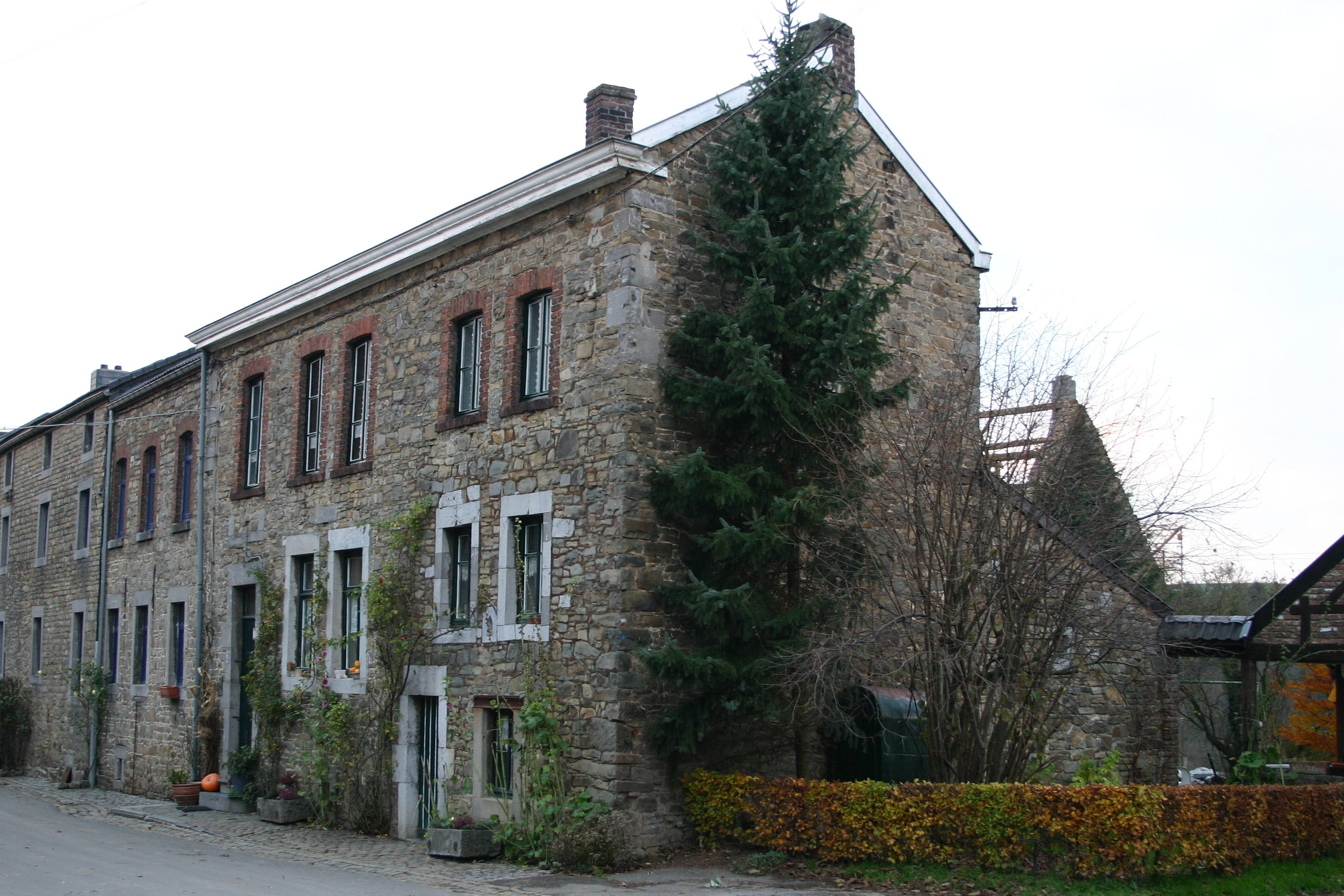 Al Haiser zu Gelivaux. Gelivaux Gelivaux